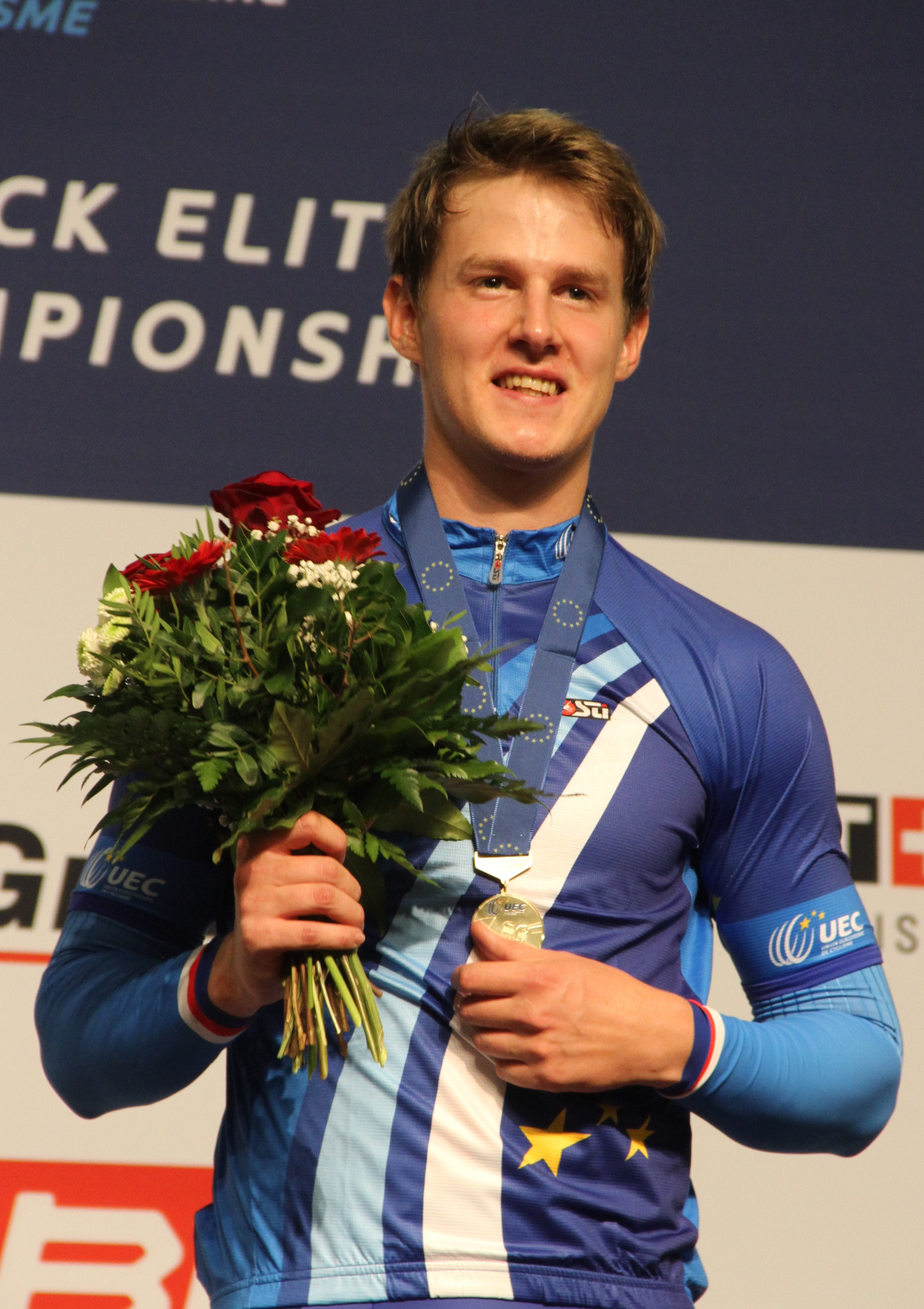 Pavel Kelemen, tschechischer Radsportler